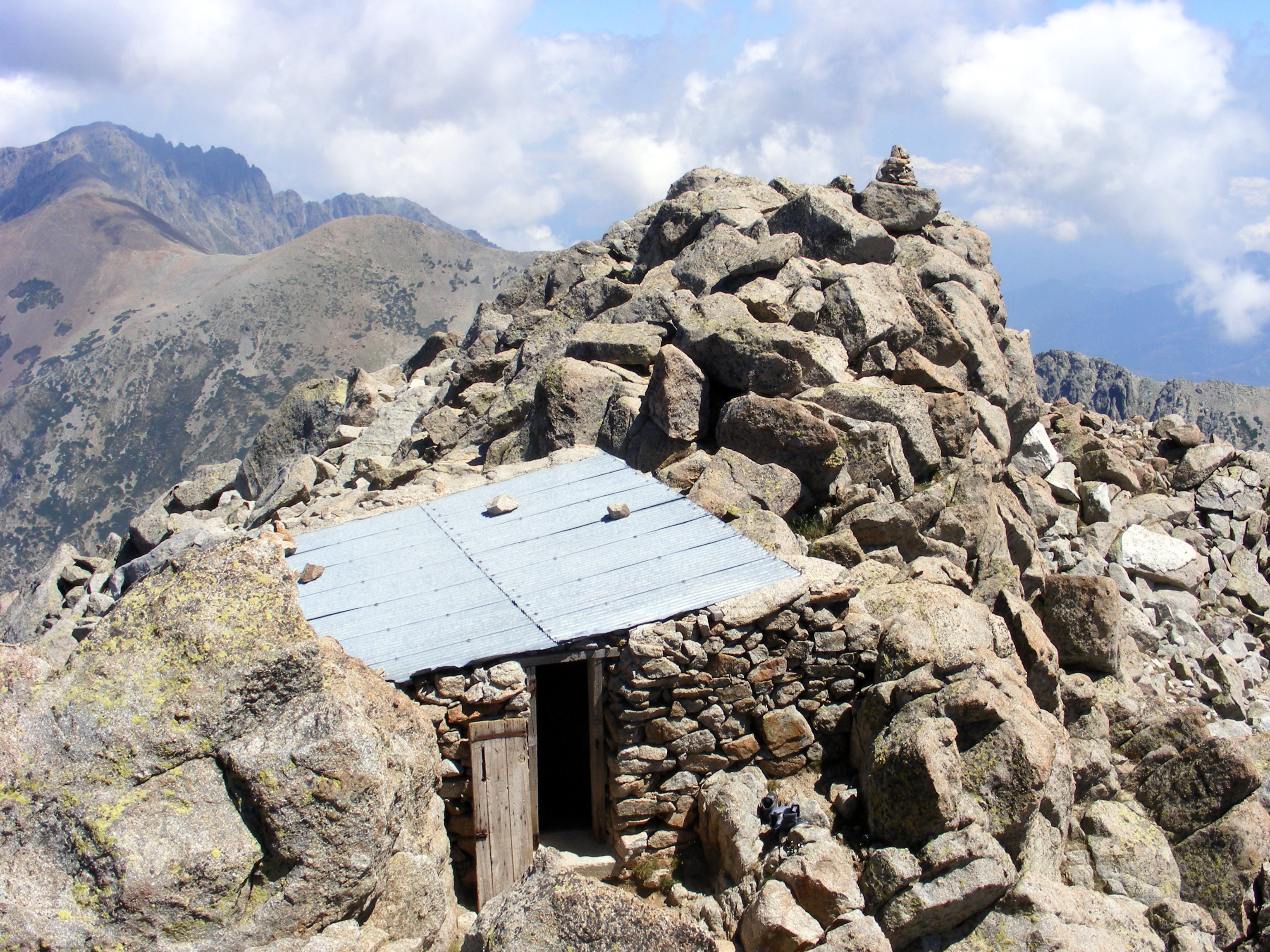 Cabane située au sommet du Monte Rotondo